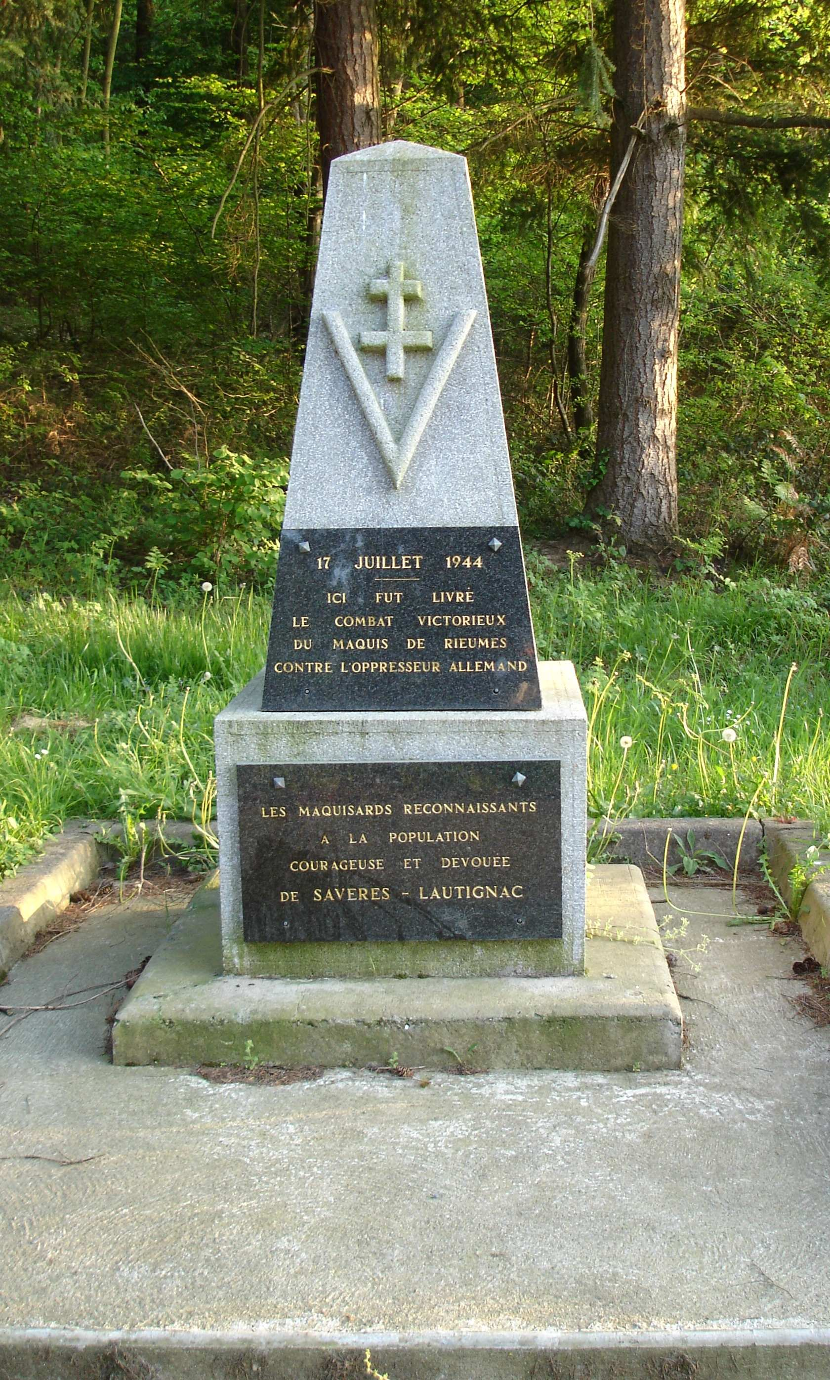 Photographie personnelle.Bouchard.daniel 10 décembre 2006 à 21:42 (CET)